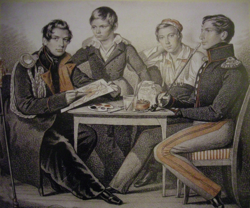 Портрет сыновей генерала Петра Петровича Коновницына: Петра (1803-1830), Алексея (1812-1852), Григория (1809-1845) и Ивана (1806-1867)